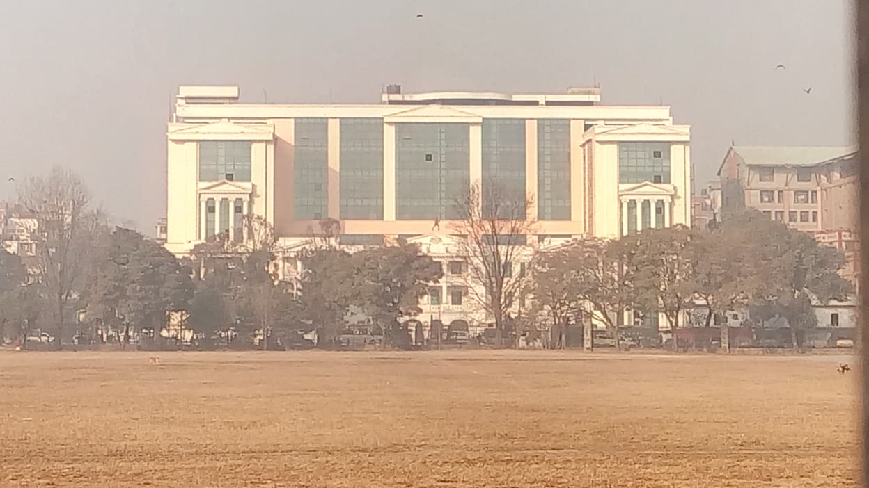 नेपाली: टुँडिखेल पारिबाट देखिएको त्रिचन्द्र सैनिक अस्पताल